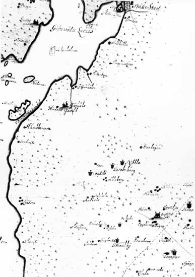 Del av karta över Mälaren mellan Stockholm och Stäket från 1675 av J Persson Giedda. Bild nr 08874.